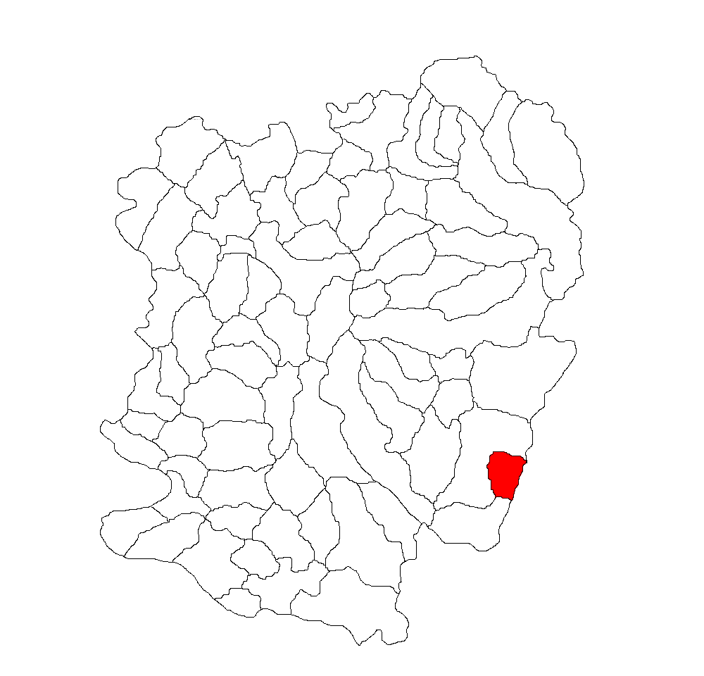 Categorie:Hărţi ale judeţului Caraş-Severin